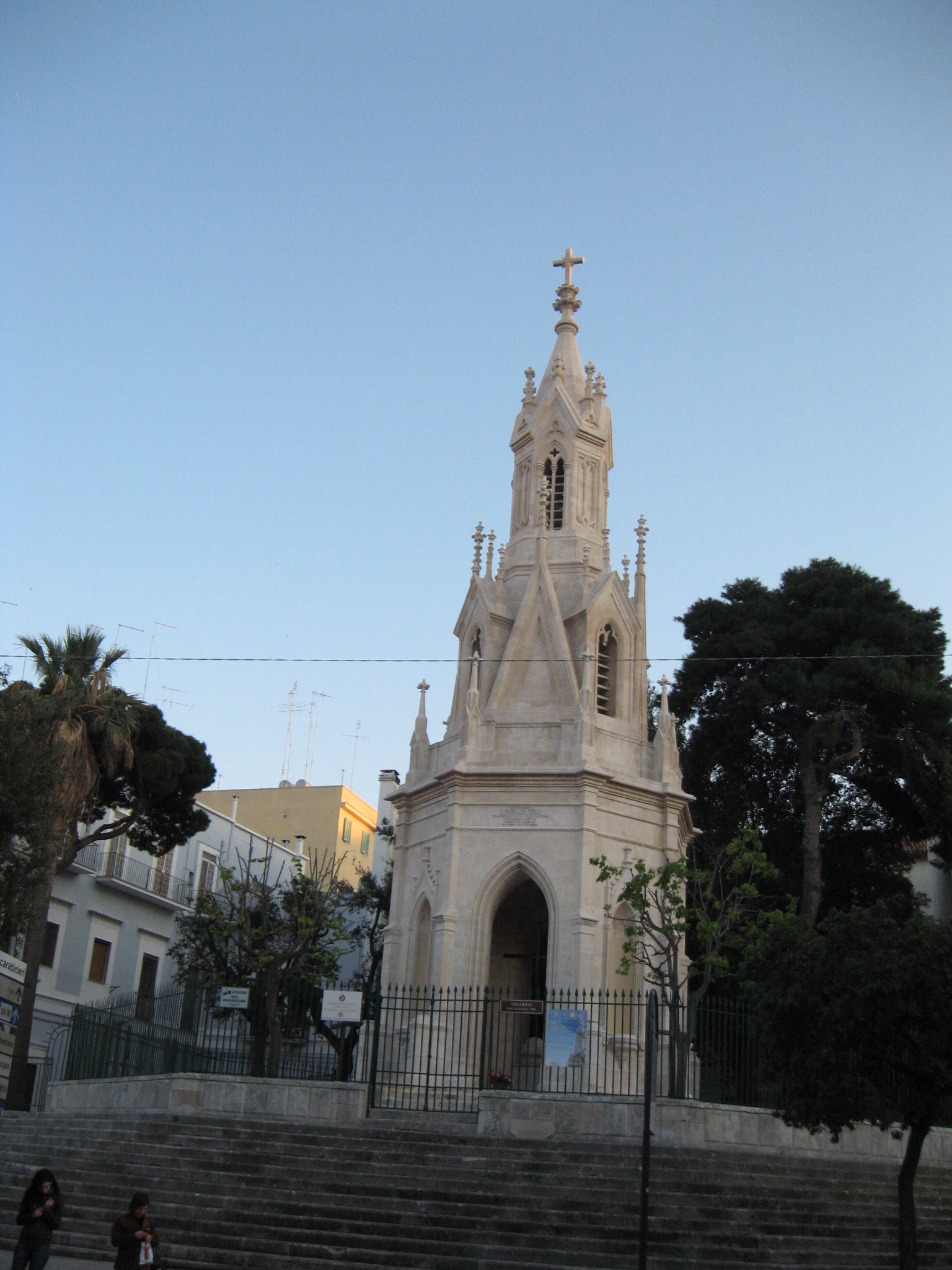 Monumento gotico del Calvario (Molfetta)